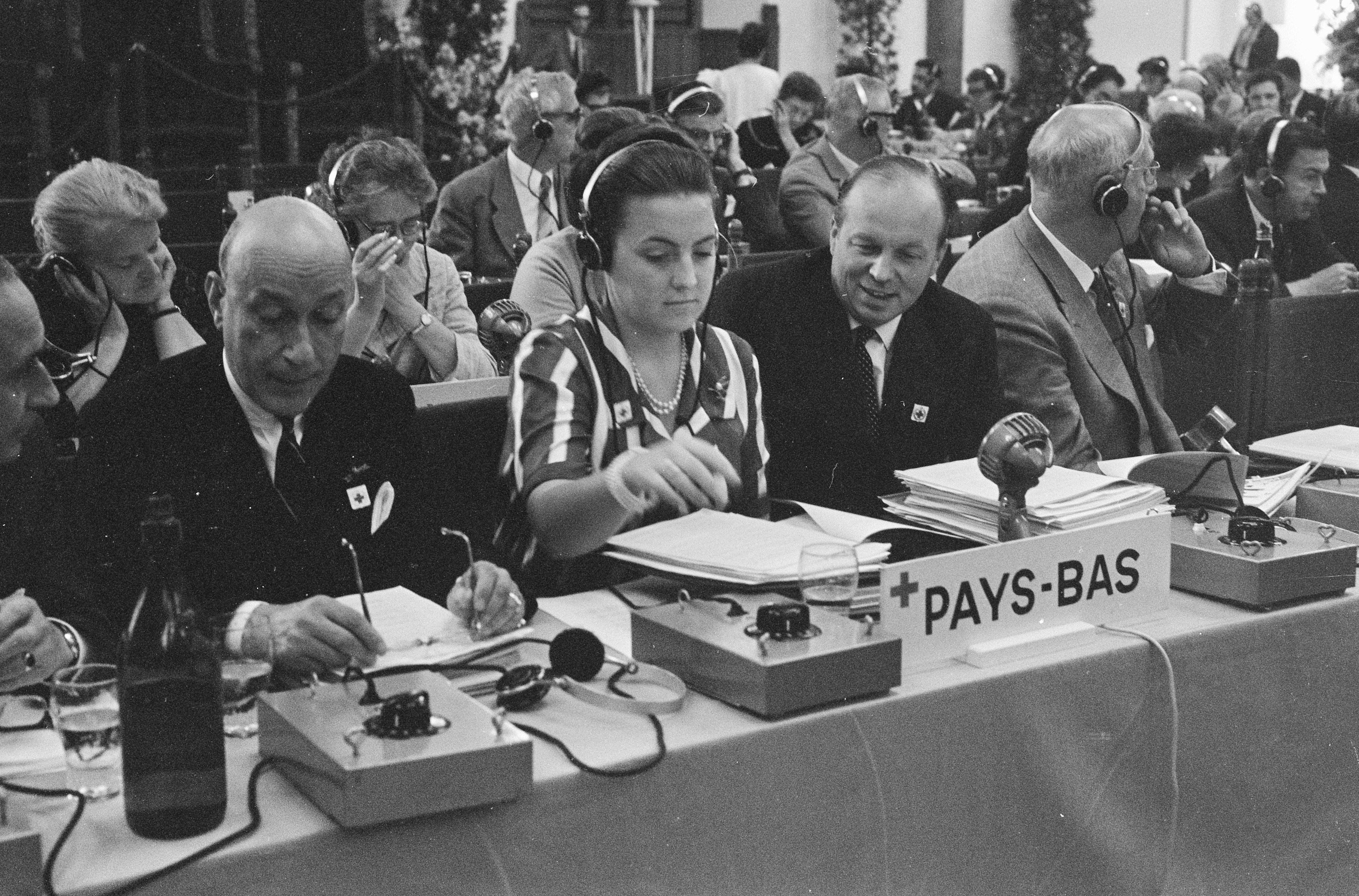 Collectie / Archief : Fotocollectie Anefo Reportage / Serie : [ onbekend ] Beschrijving : Honderd jaar Rode Kruis. Prinses Margriet lid dagelijks bestuur tijdens vergadering links dhr. A. van Emden en rechts Gualtherus [Guup] baron Kraijenhoff Datum : 8 september 1967 Trefwoorden : vergaderingen Persoonsnaam : Emden, A. van, Kraijenhoff, Gualtheris baron, Kraijenhoff, Guup, Margriet (prinses Nederland) Fotograaf : Koch, Eric / Anefo, [onbekend] Auteursrechthebbende : Nationaal Archief Materiaalsoort : Negatief (zwart/wit) Nummer archiefinventaris : bekijk toegang 2.24.01.05 Bestanddeelnummer : 920-6833